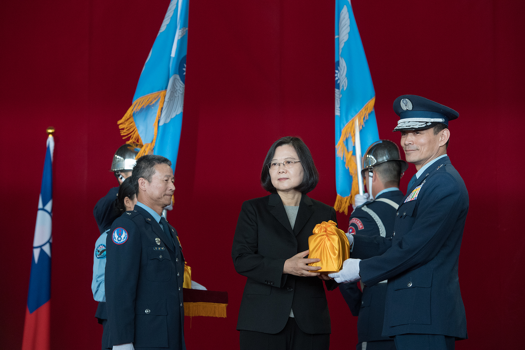 12.01 總統主持P-3C成軍暨S-2T除役及飛行部隊番號更銜典禮，並親自授旗、授印